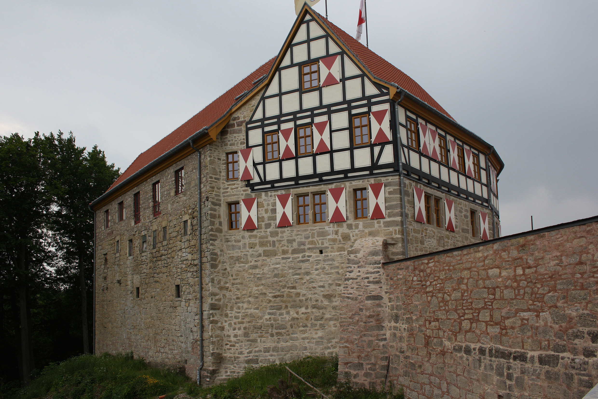 Nordwestseite der Kernburg